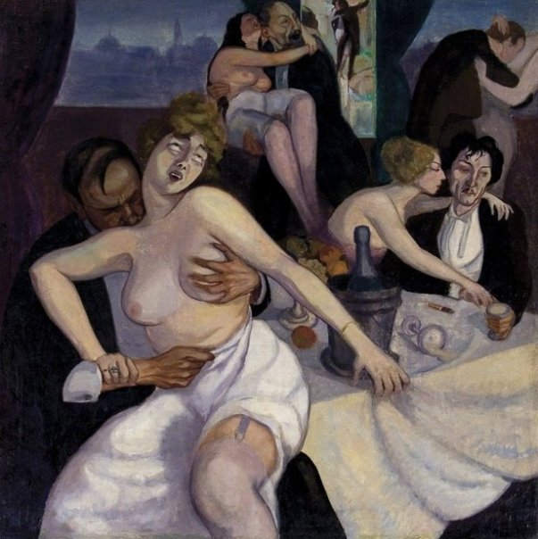 "Paris"